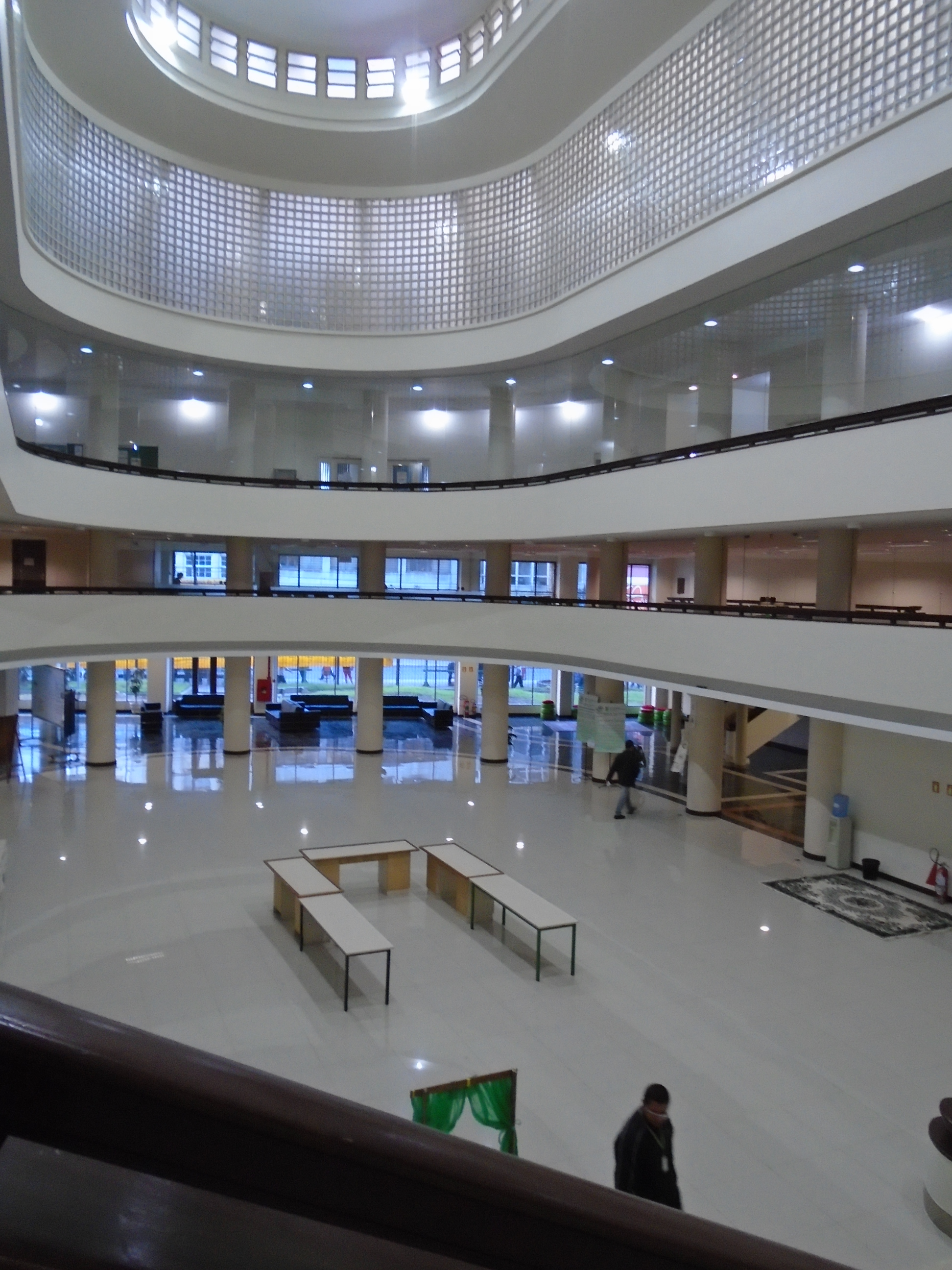 Instituto Federal do Rio Grande do Sul - Campus Porto Alegre